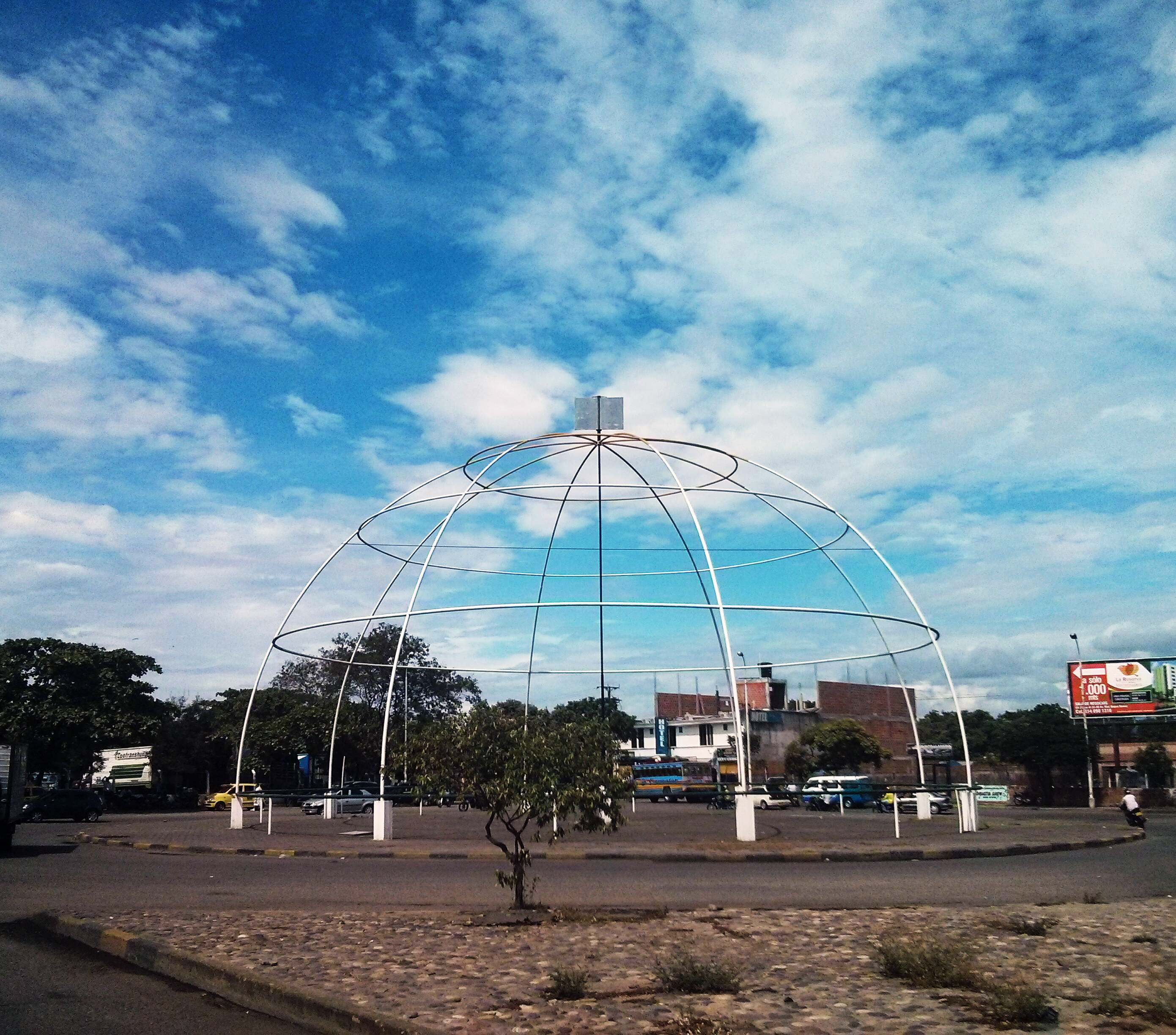 Ubicación: NEIVA, HUILA "Este lugar representa la hermandad entre Colombia e Indonesia, países antípodas entre sí, es decir, que están diametralmente opuestos en el globo terráqueo"